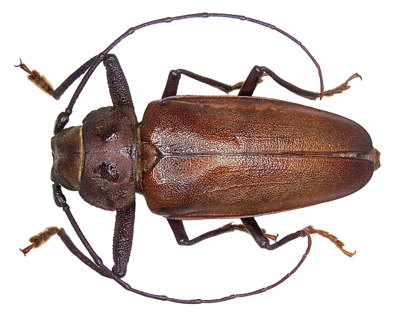 Familie: Cerambycidae Grösse: 25-60 mm Verbreitung: Europa, Nordafrika Ökologie: Entwicklung in Kiefernstöcken Fundort: Korsika, Asco-Tal leg. det. U.Schmidt, 1973 Foto: U.Schmidt, 2005